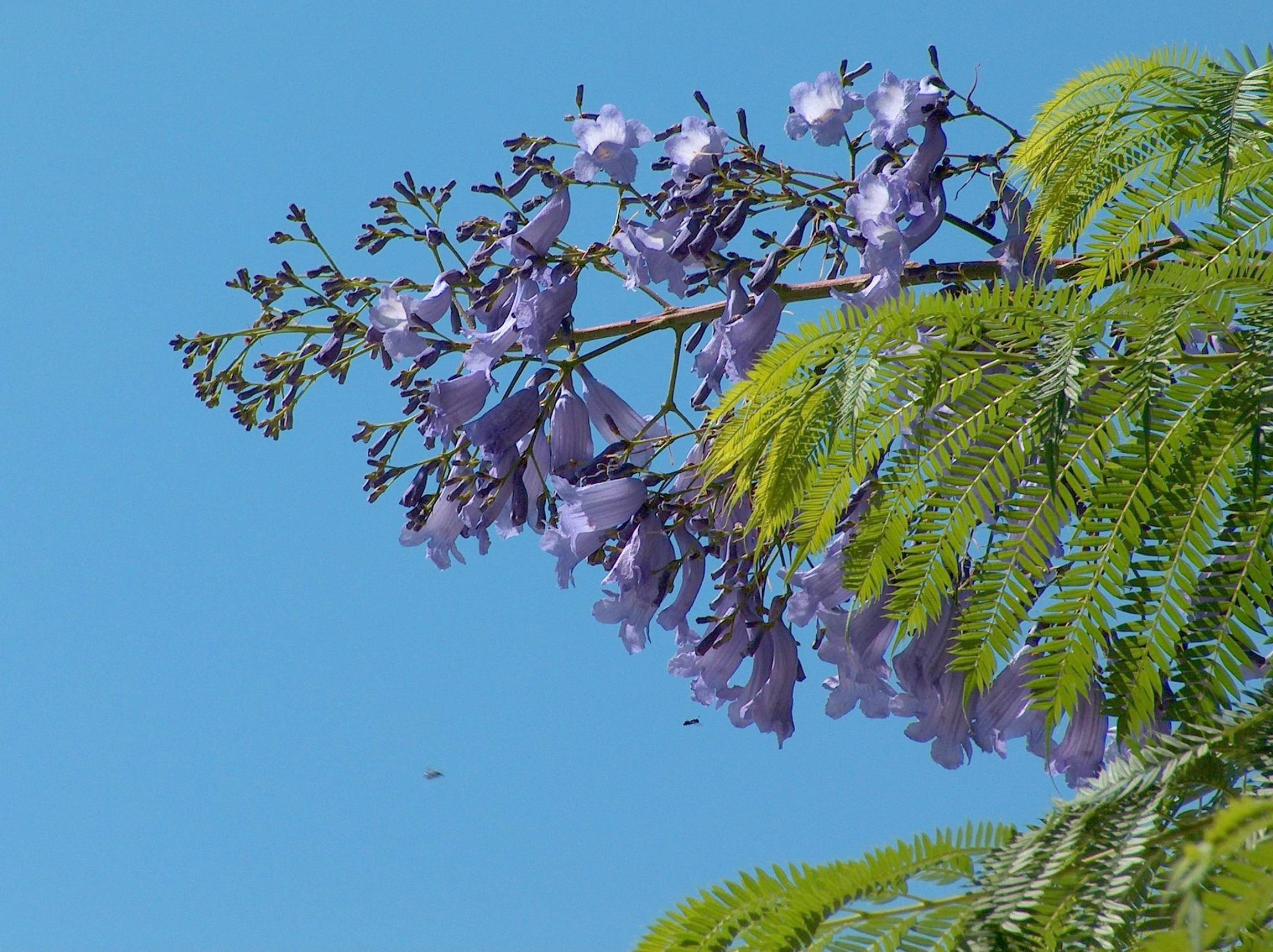 Jacaranda mimosifolia (Jacarandá) : Racimo floral - Rambla del Charco, Águilas (Murcia, España).